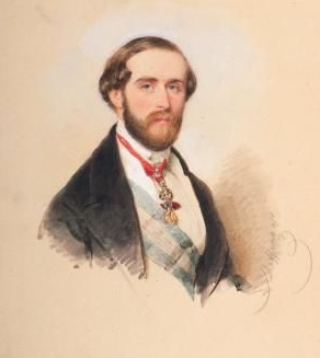 Jean de Bourbon (1822-1887). Roi de France de droit à la mort d'Henri V.